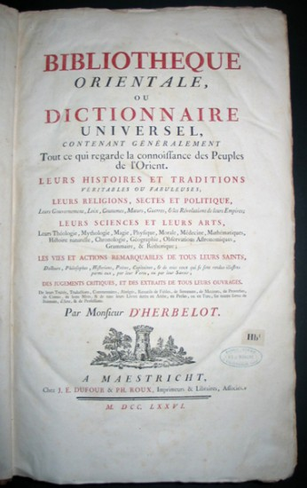 Title page of "Bibliothèque orientale" by French orientalist Barthélemy d'Herbelot de Molainville (1625-1695)